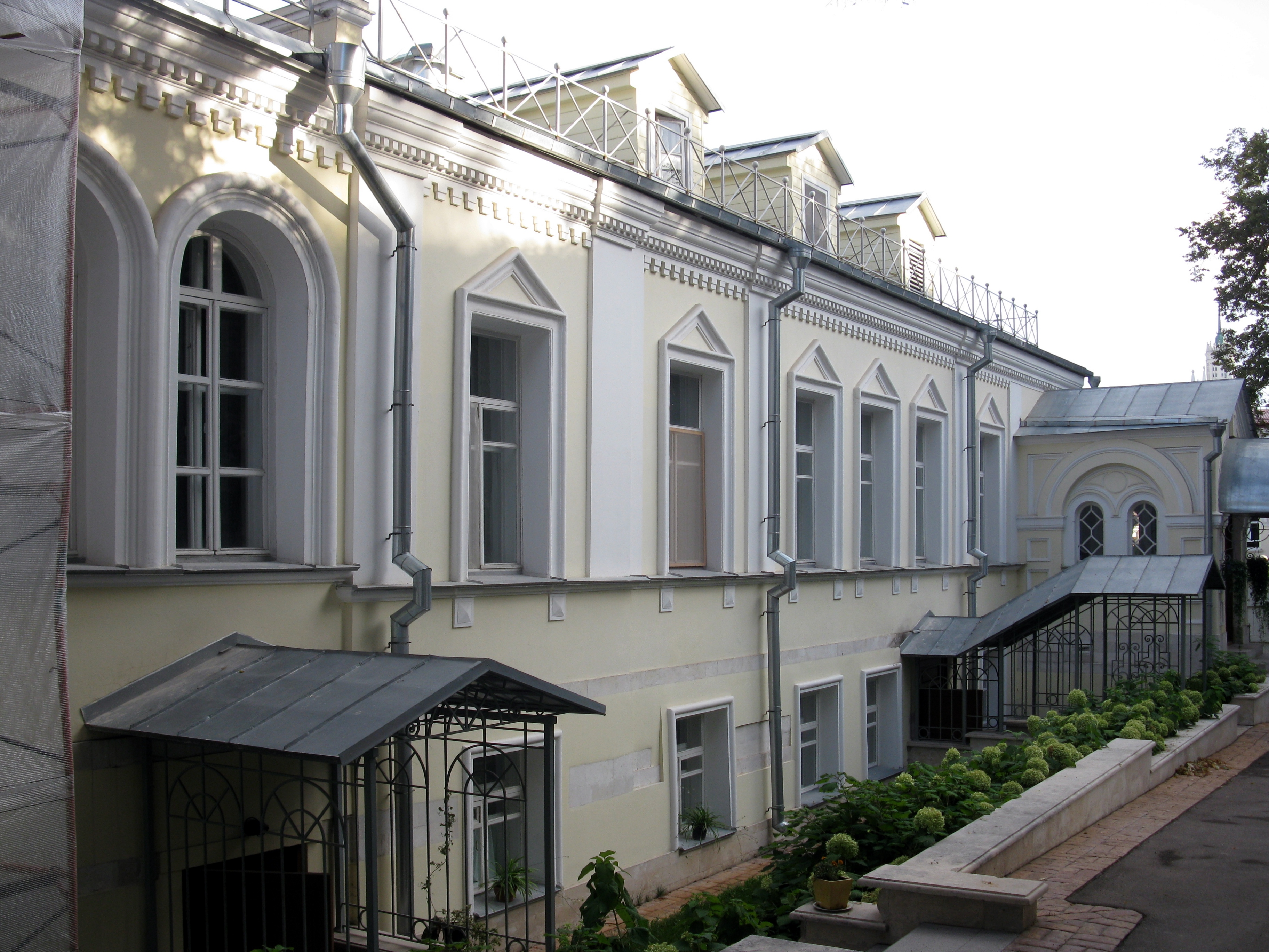 Восточный дом причта со служебными постройками: Ивановский М. пер., дом 2/4, строение 3, Басманный, Центральный округ, Москва